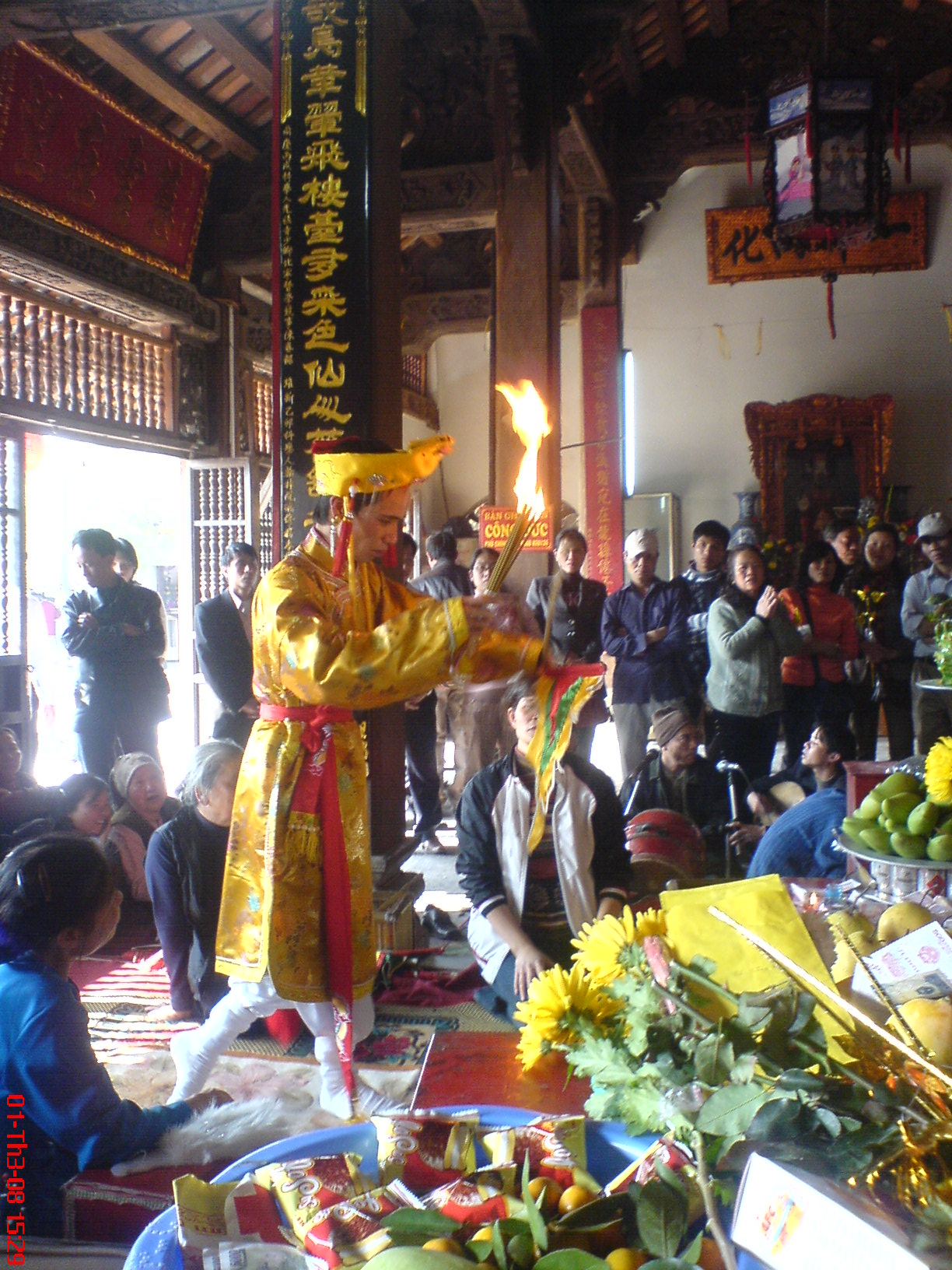 Hầu đồng in Phủ Giầy , Viet nam